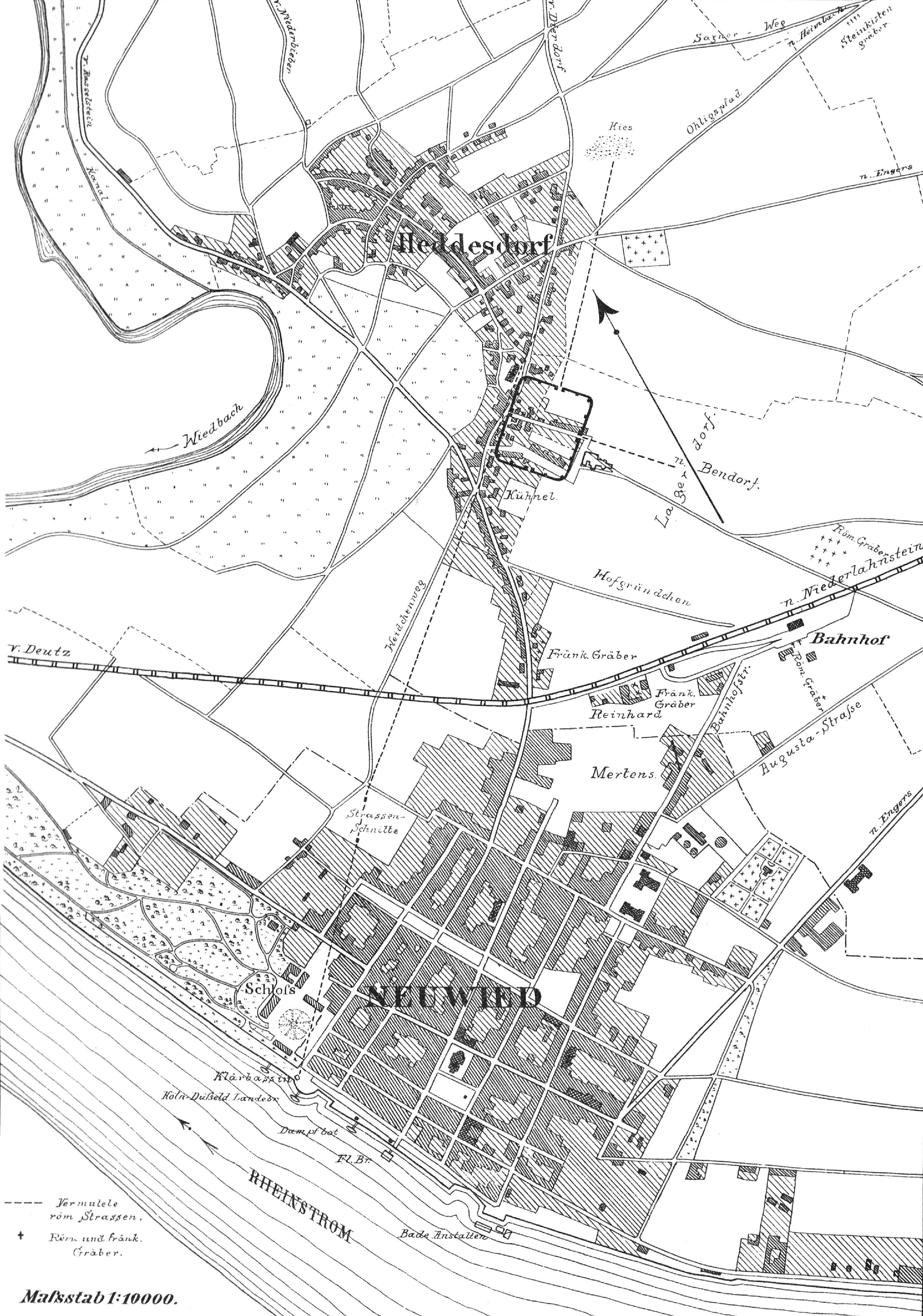 Lageplan des Kastells Heddesdorf, ORL 1